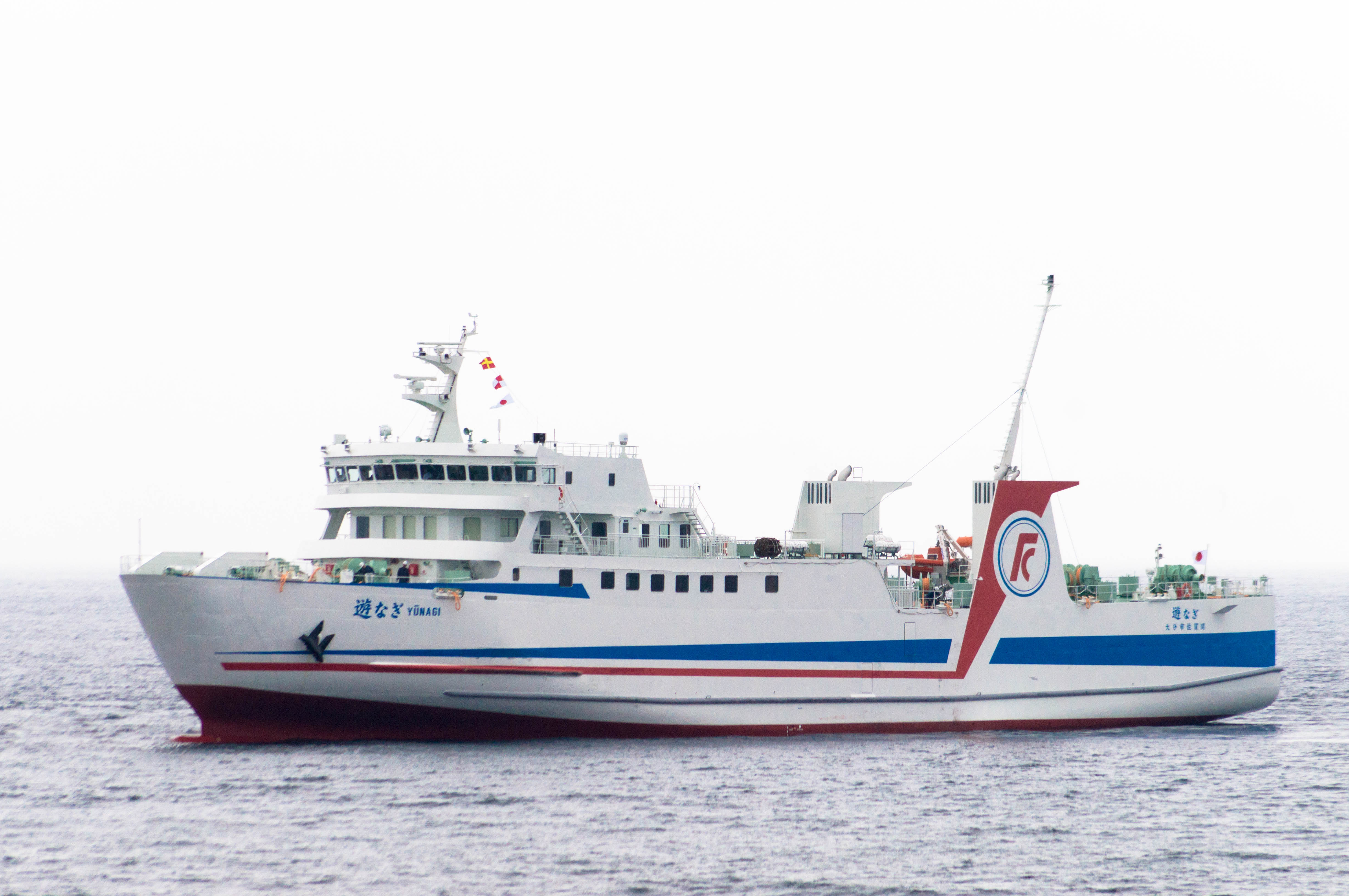 国道九四フェリー「遊なぎ」（2016年7月17日、佐賀関沖）